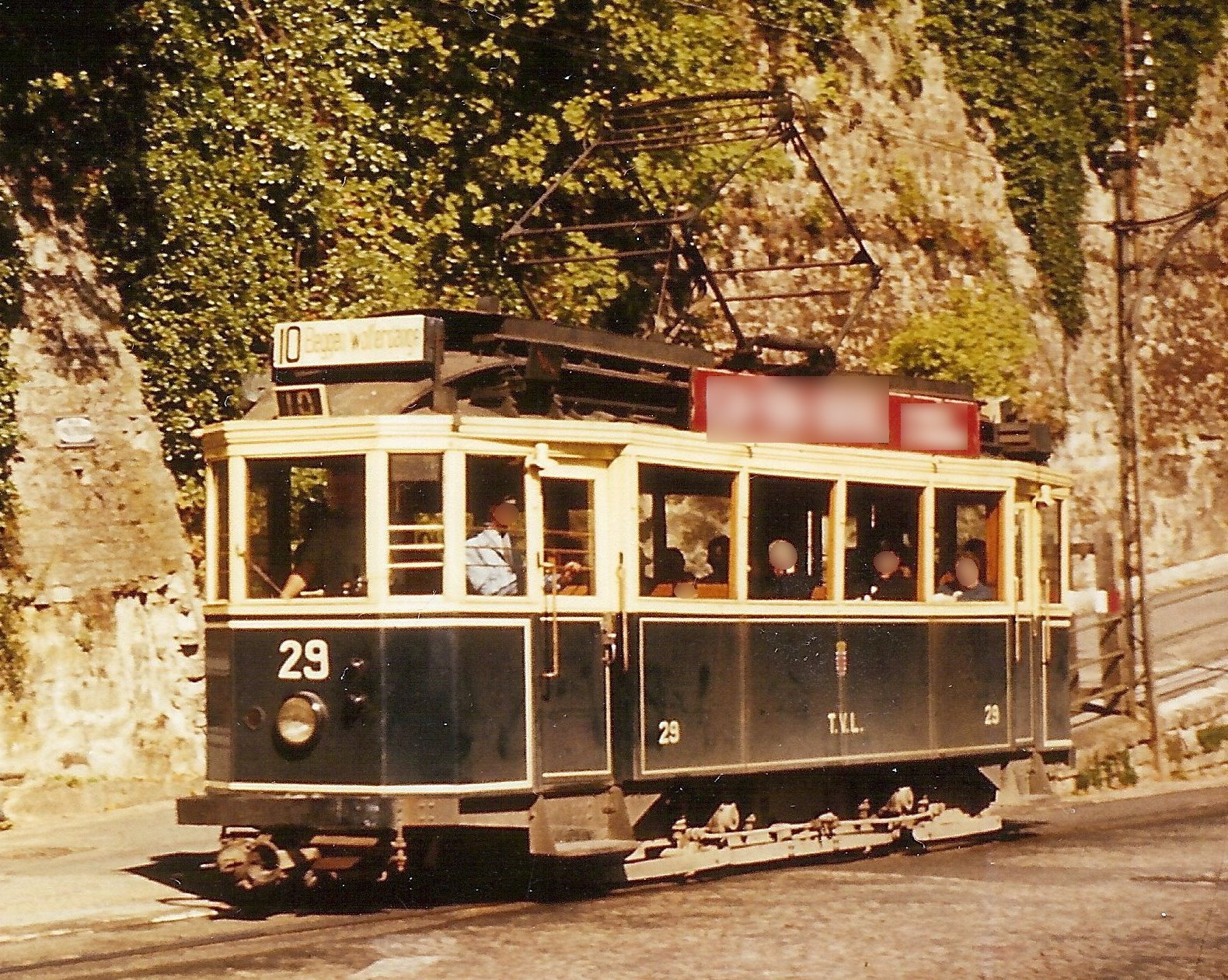 Motrice n°29 (Nivelles/ACEC, 1926) en 1964 sur la dernière ligne en service (ligne n°10)